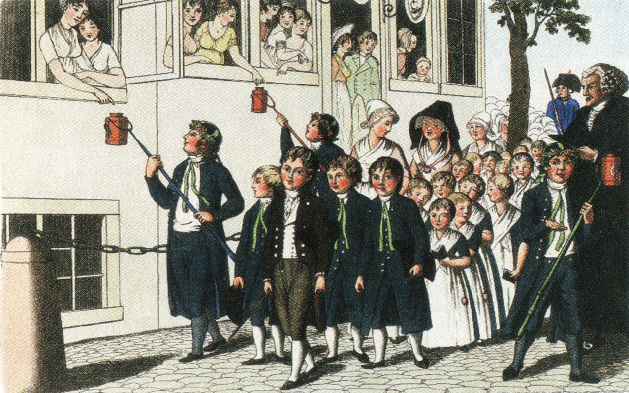 Alljährlicher Spenden-Umzug der Waisenhauskinder, die ihre Sammelbüchsen an langen Stangen den Bürgern in die Fenster halten, kolorierte Radierung von Christoffer Suhr, um 1800